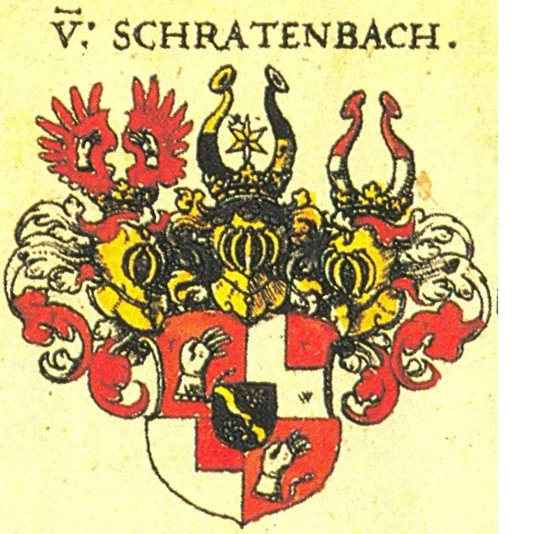 Znak rodu Schrattenbachů podle Siebmachera